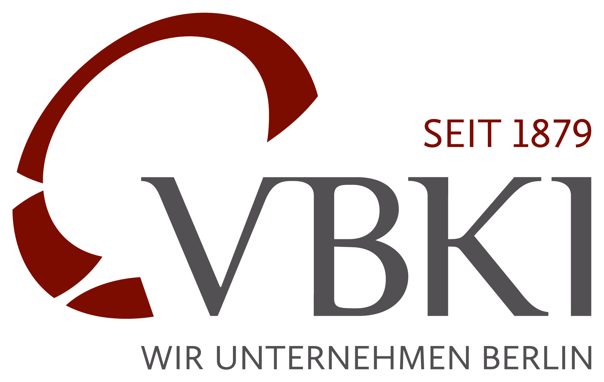 VBKI logo